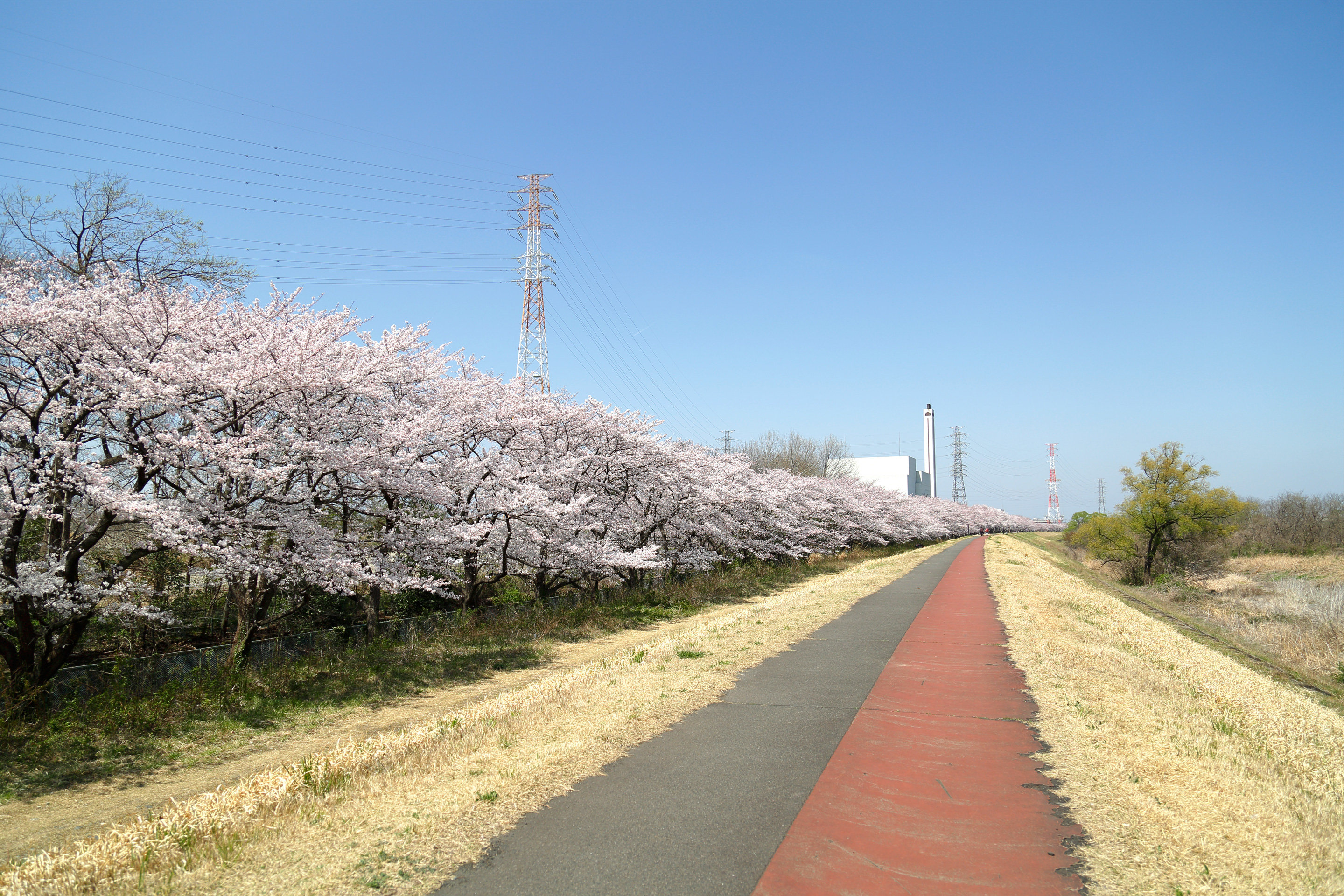 根川 (日野市)の桜並木。